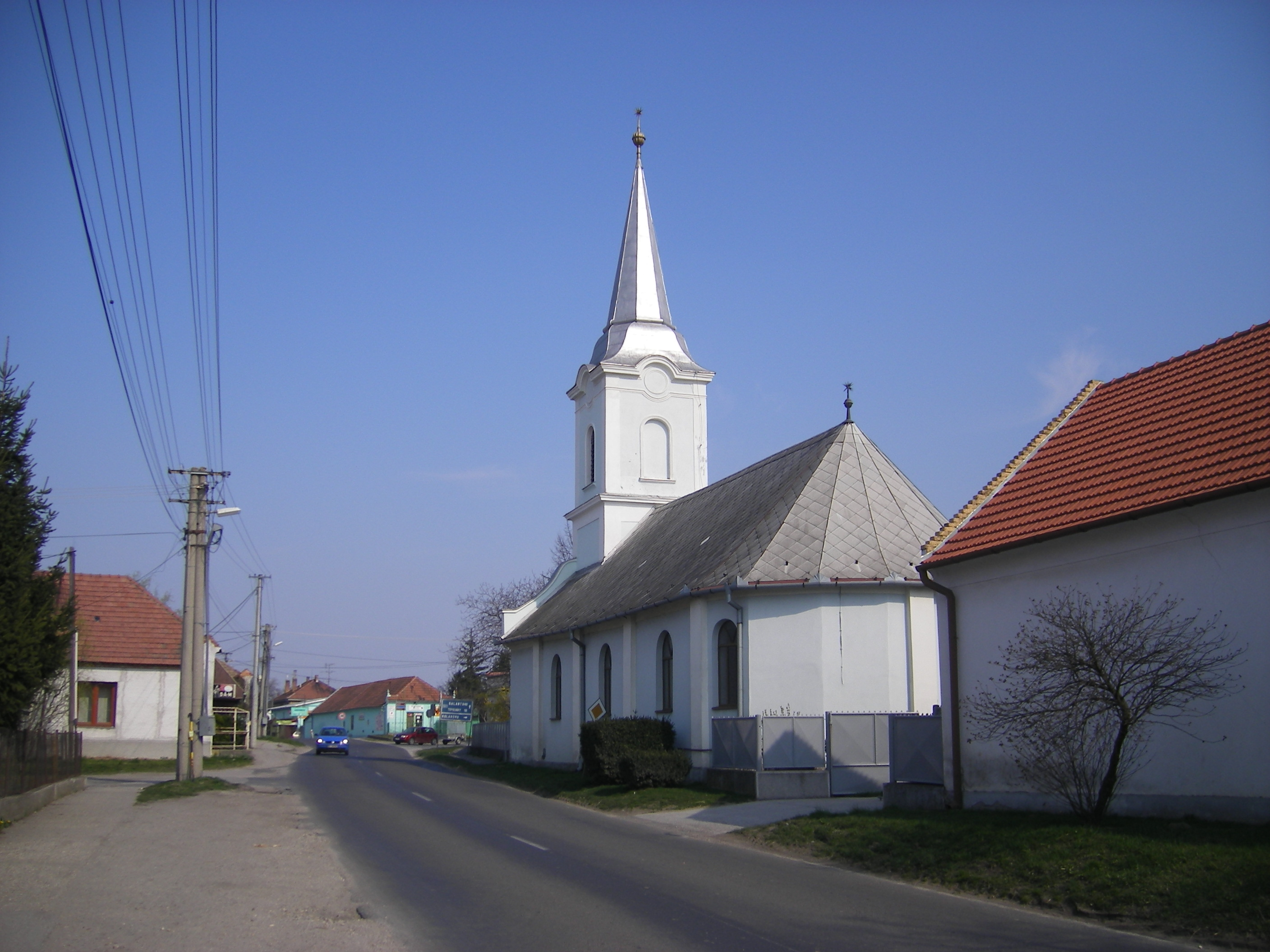 Ekecs, református temploma